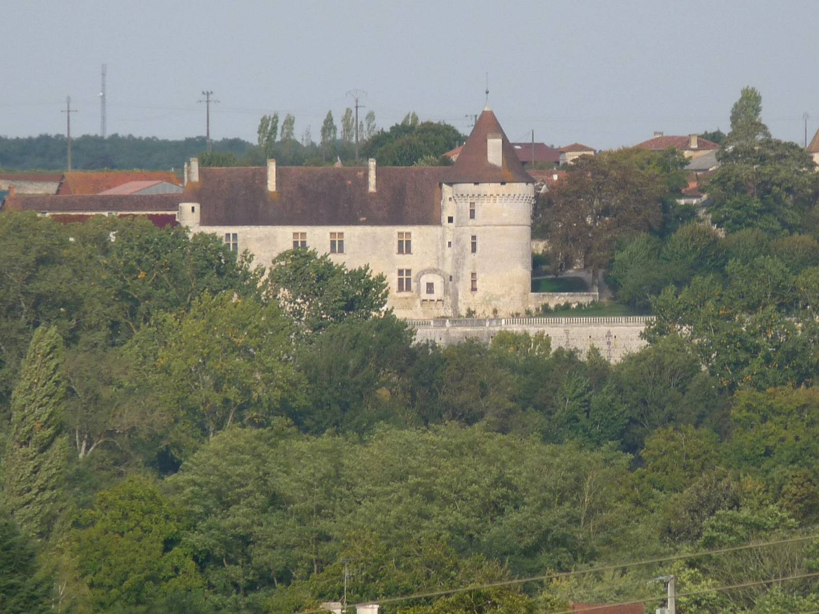 château de Bayers, Charente, France